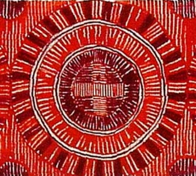 Мотив од пазувје на ален шајак, с. Долно Ореово, Мало Мариово